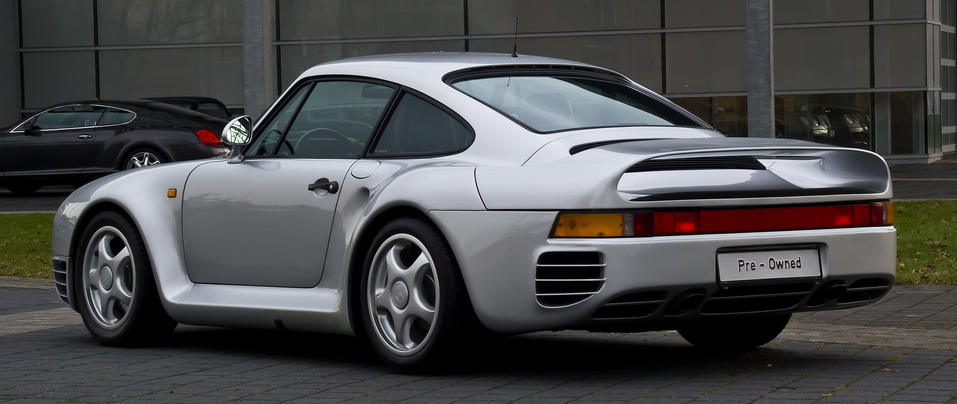 Heckansicht eines Porsche 959.